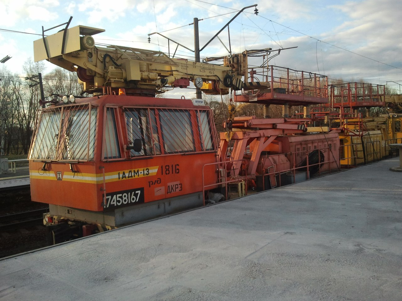 Станция Александровская, ОЖД.